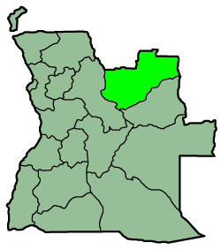 A map from province Lunda Norte, Angola